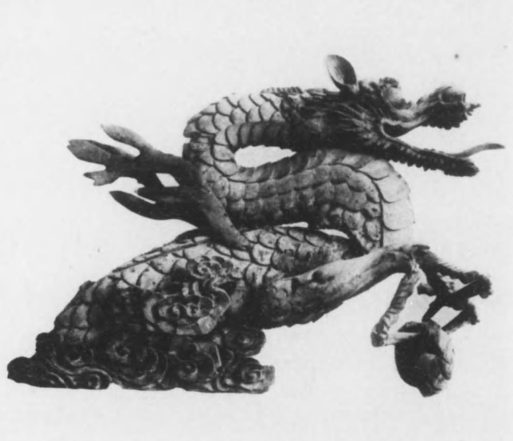 日本丸（安宅船）の船首像 木彫製（樟材）、総高さ5尺8寸（1.76m）、長さ1丈8寸（3.27ｍ） 伝左甚五郎作 昭和20年戦災で焼失